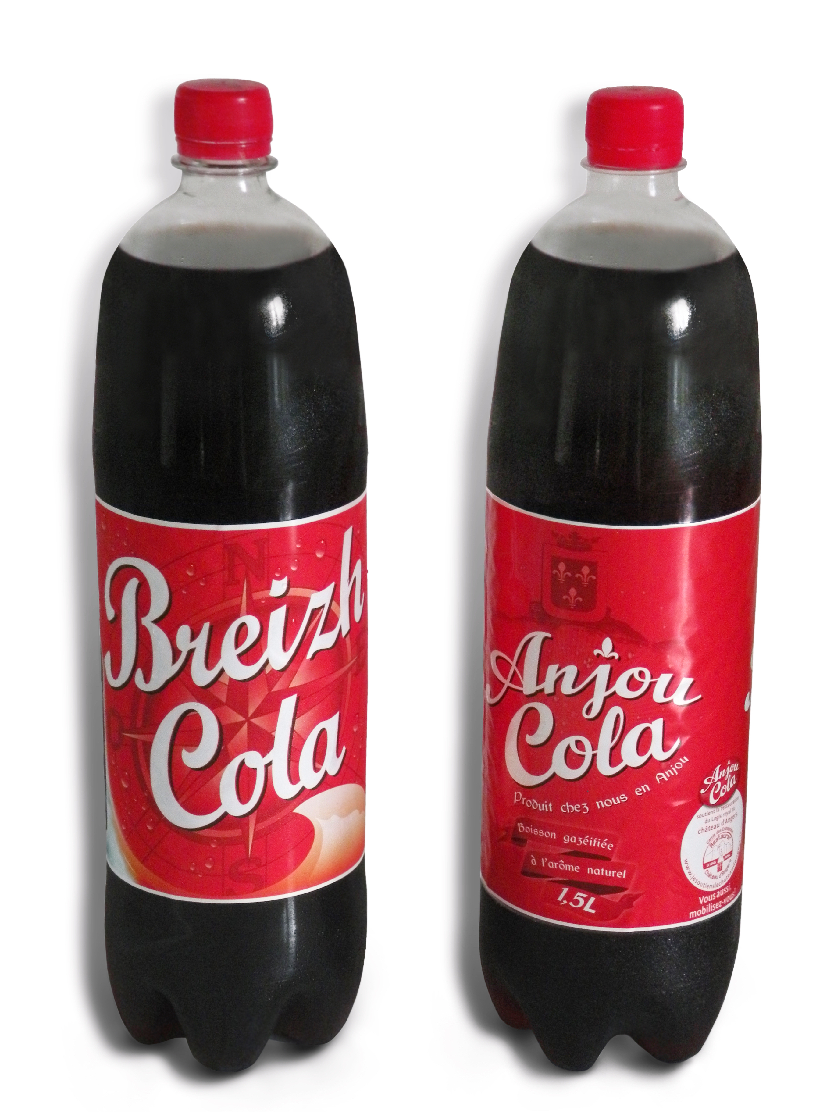 Deux bouteilles de cola : Breizh Cola et Anjou Cola.